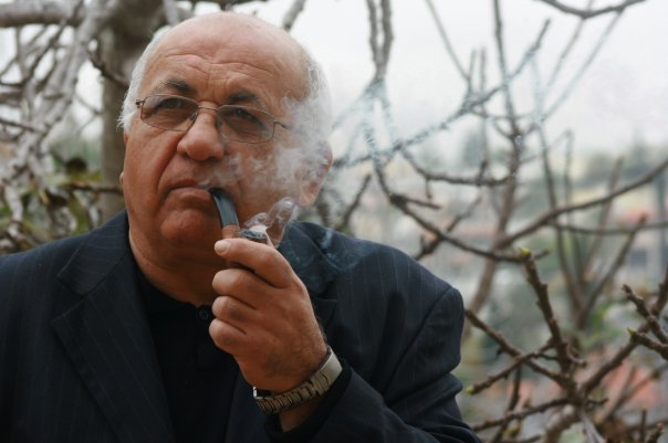 סלמאן נאטור